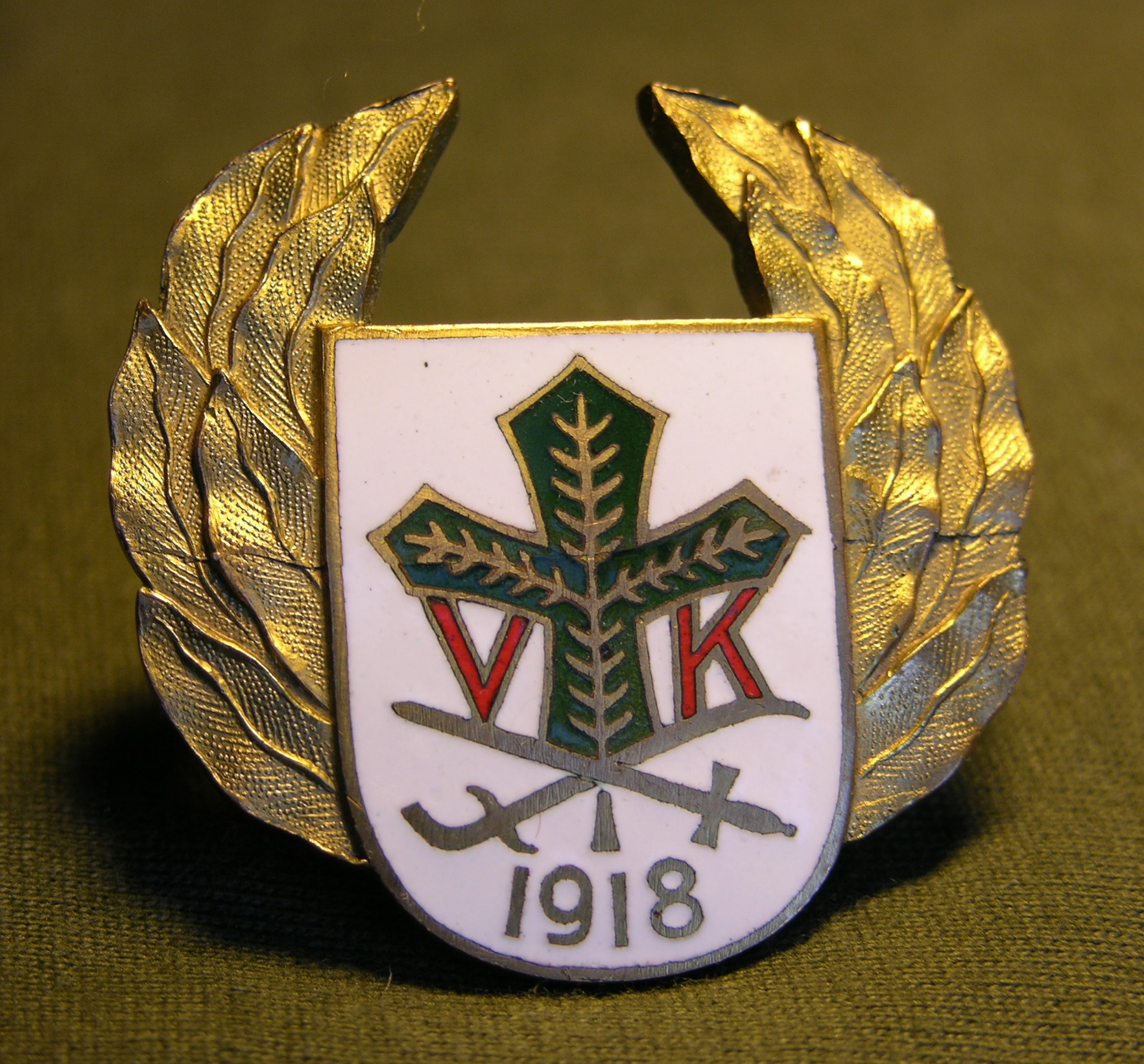 Vöyrin koulun kurssimerkki. Design: Jorma Gallén-Kallela.